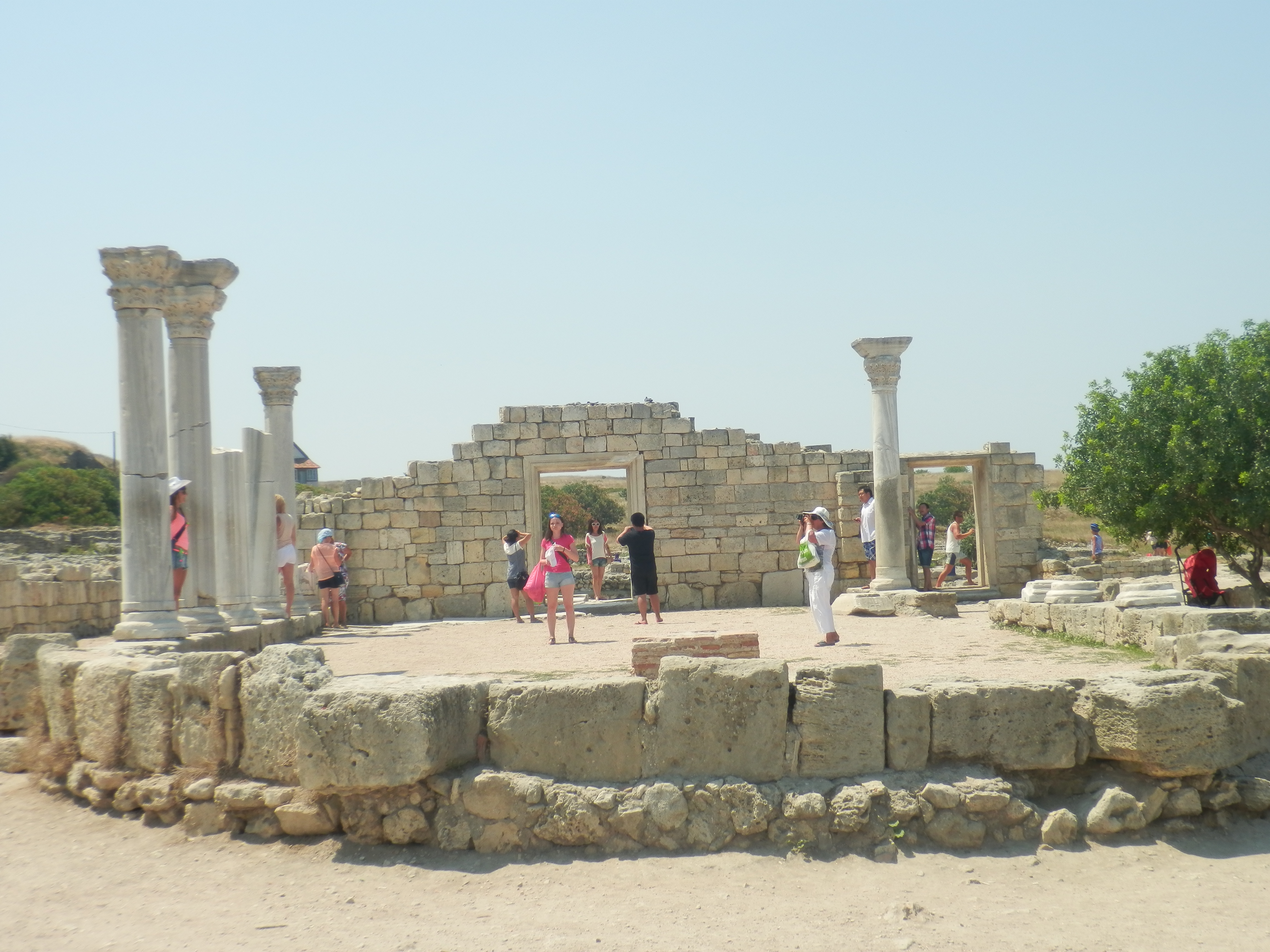 Комплекс "Стародавнє місто Херсонес-Таврійський", Севастополь, вул. Древня, 1